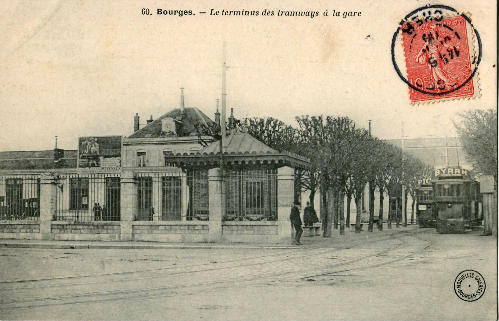 Carte postale ancienne éditée par Nouvelles galeries de Bourges, n°60 :BOURGES - Le terminus des tramways à la gare